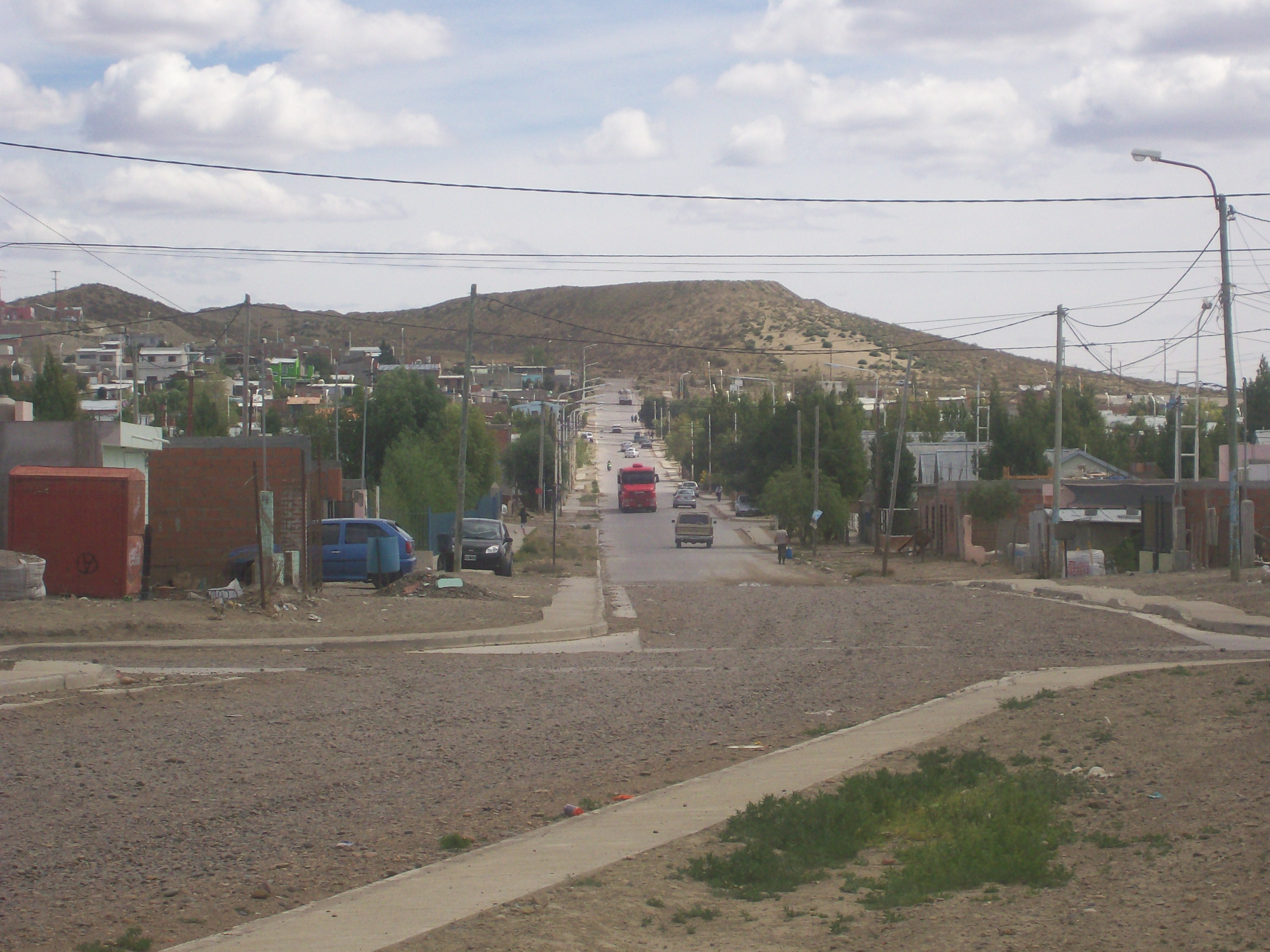 Avda. ubicada en el Bo. 17 de Octubre